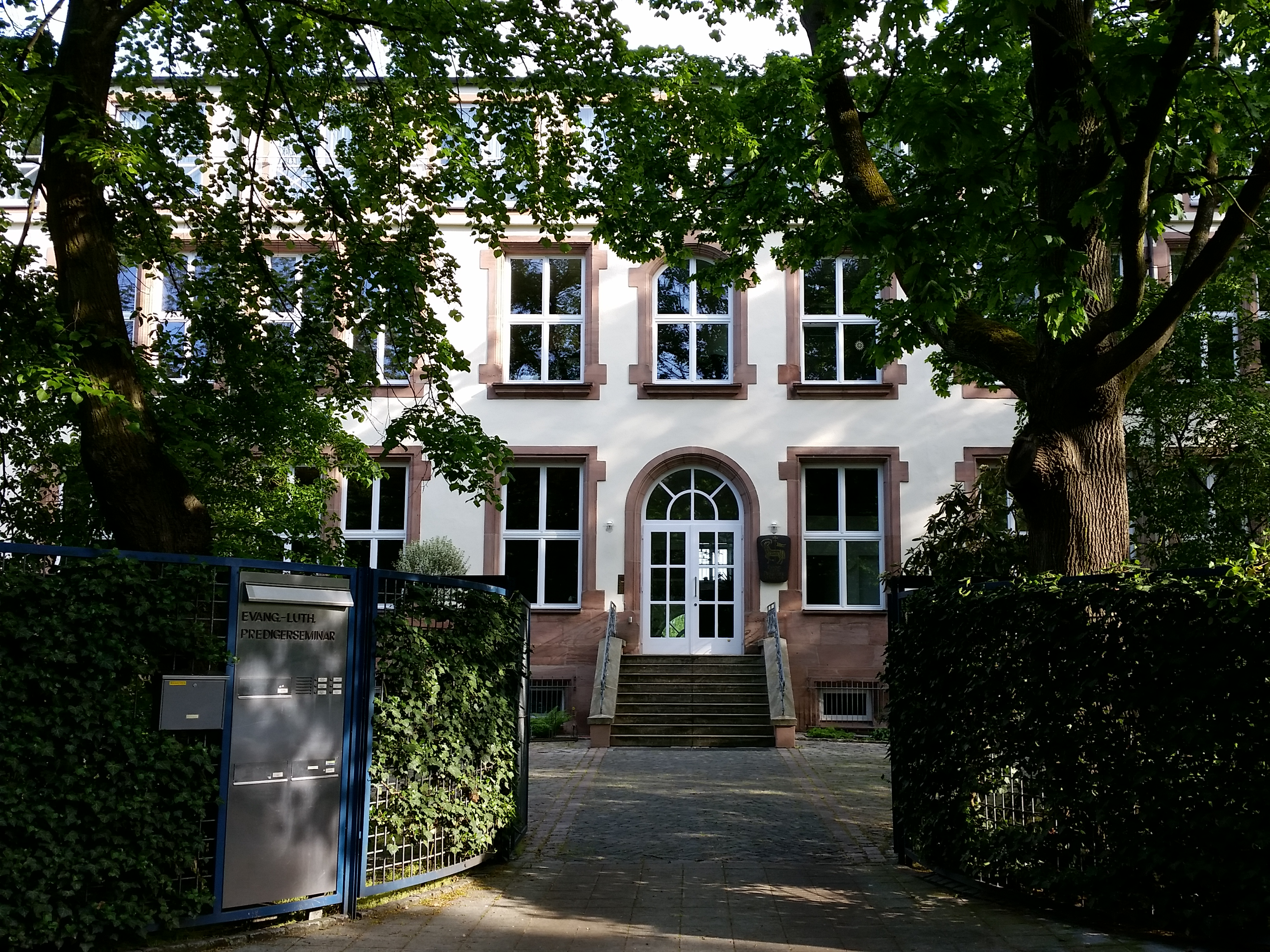 Predigerseminar Nürnberg; Veilhofstraße 24, 90489 Nürnberg